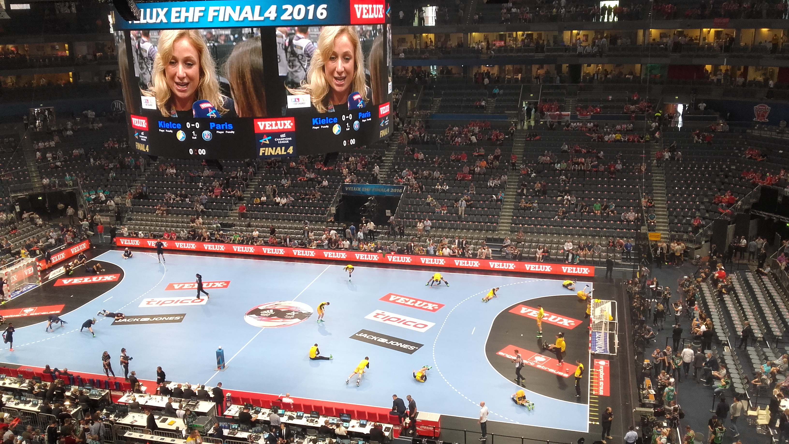 Instantes antes del comienzo de la Final Four de balonmano en el Kolnarena